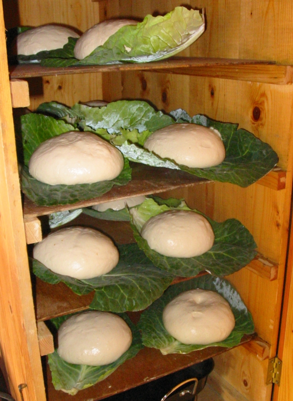 Des pains Jèrriais à Hamptonne, La Faîs'sie d'Cidre 2007